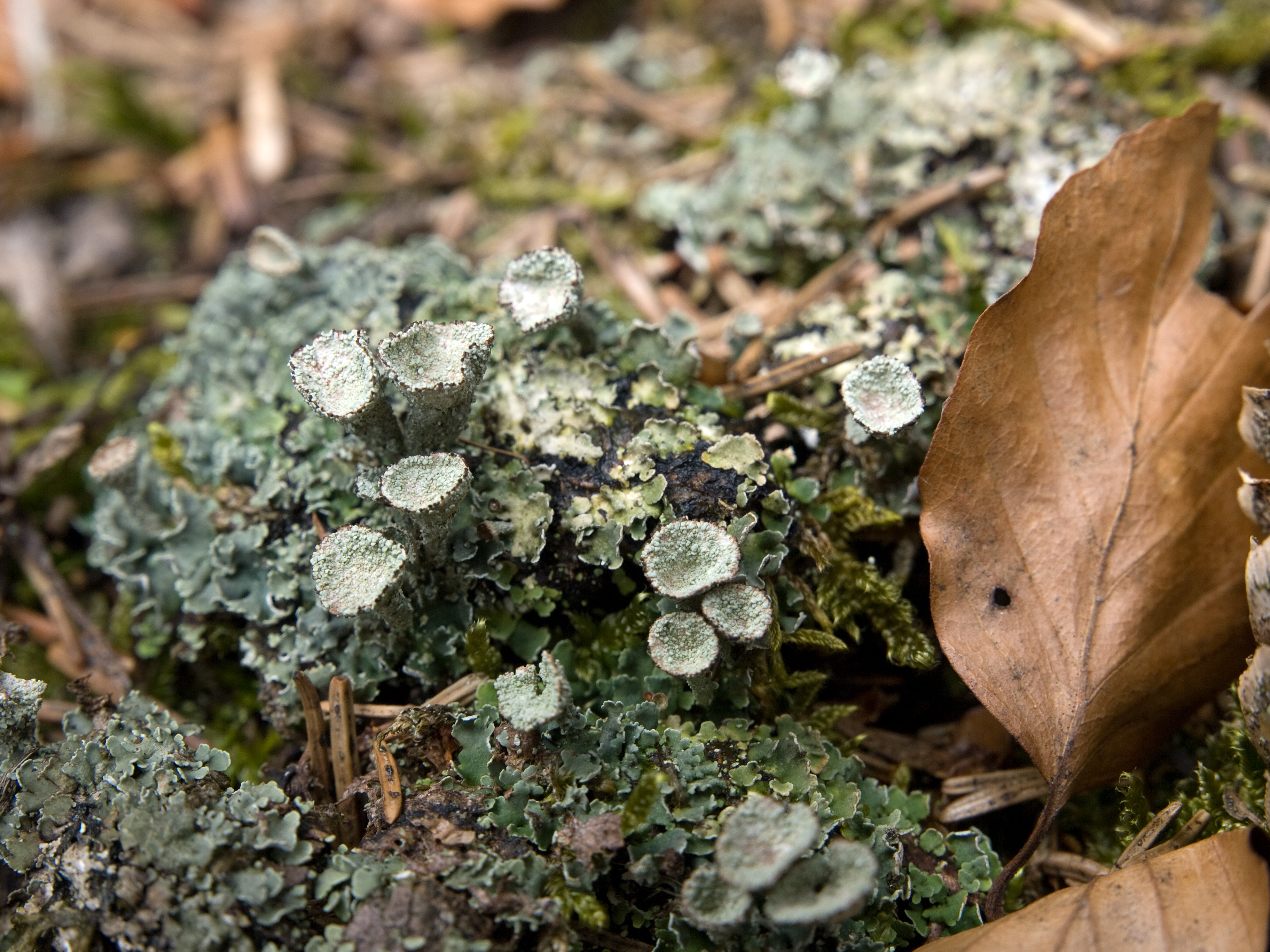 Cladonia pyxidata Picture taken in Berchtesgaden/Bavaria